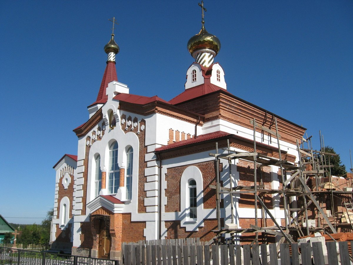 Зембін. Аднаўленне царквы